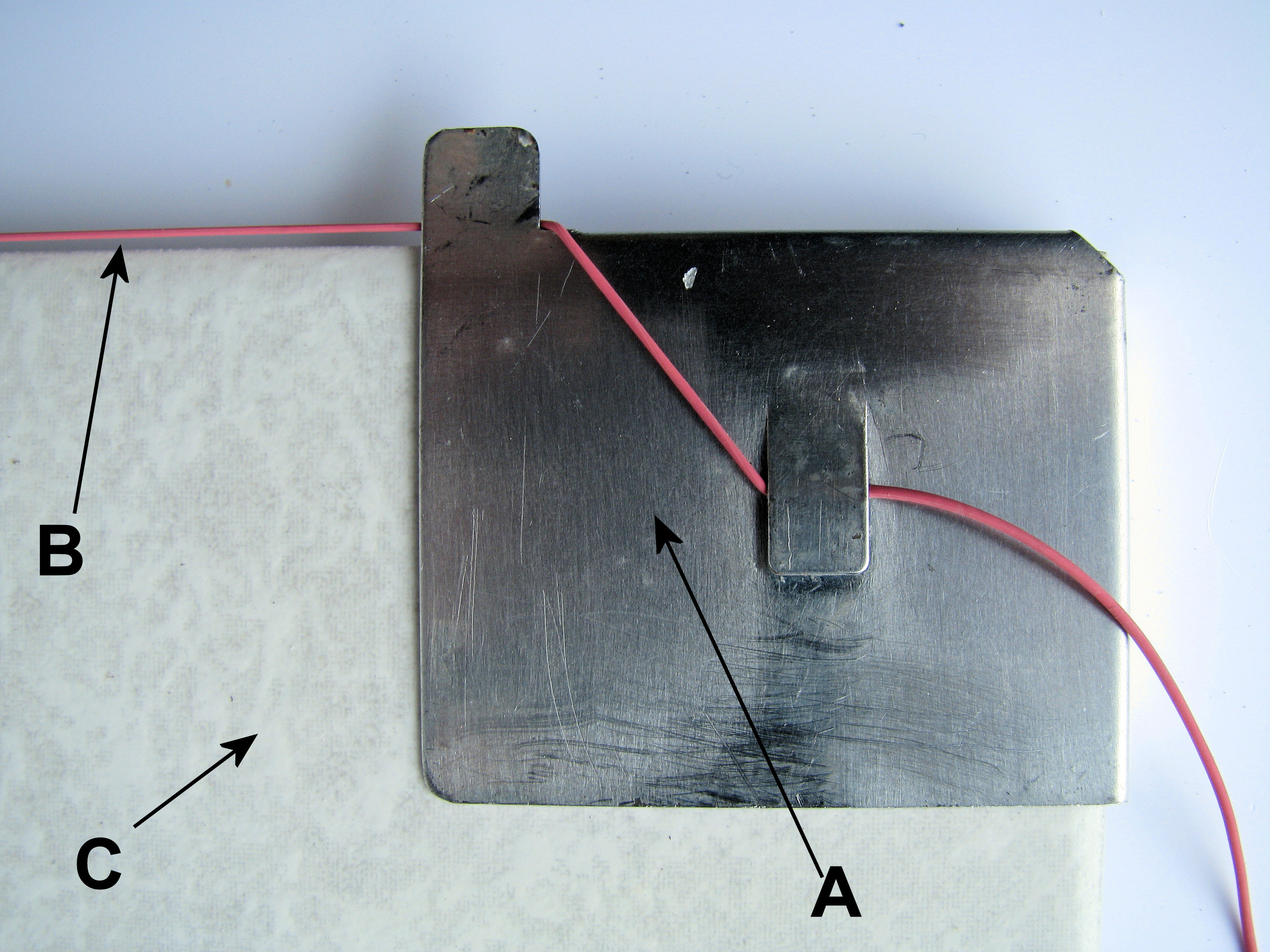 Eine Fliesenhexe mit Gummischnur. Auch Fliesenecken oder Fliesenlegerecken genannt.